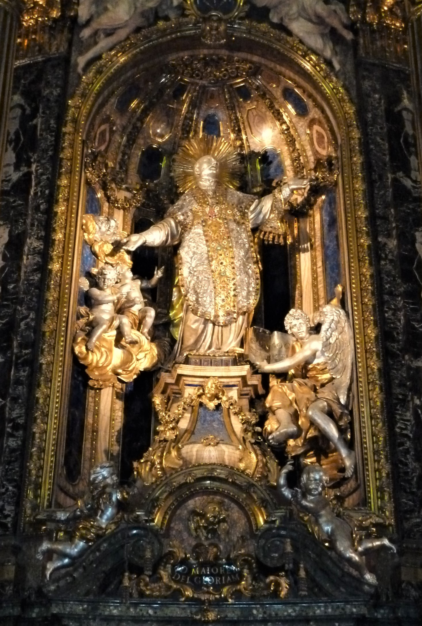 zilveren beeld van Sint Ignatius in de Gesù te Rome